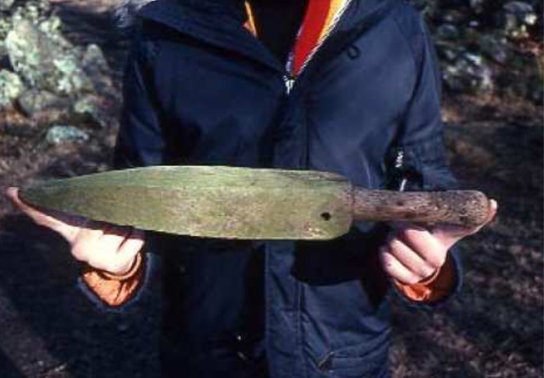 Stric, teclyn i finiogi pladur, wedi ei ddarganfod ymysg hen wastraff yn Ardudwy, 1970au. Fe’i gorchuddir gyda saim a grut cyn llifio’r llafn.